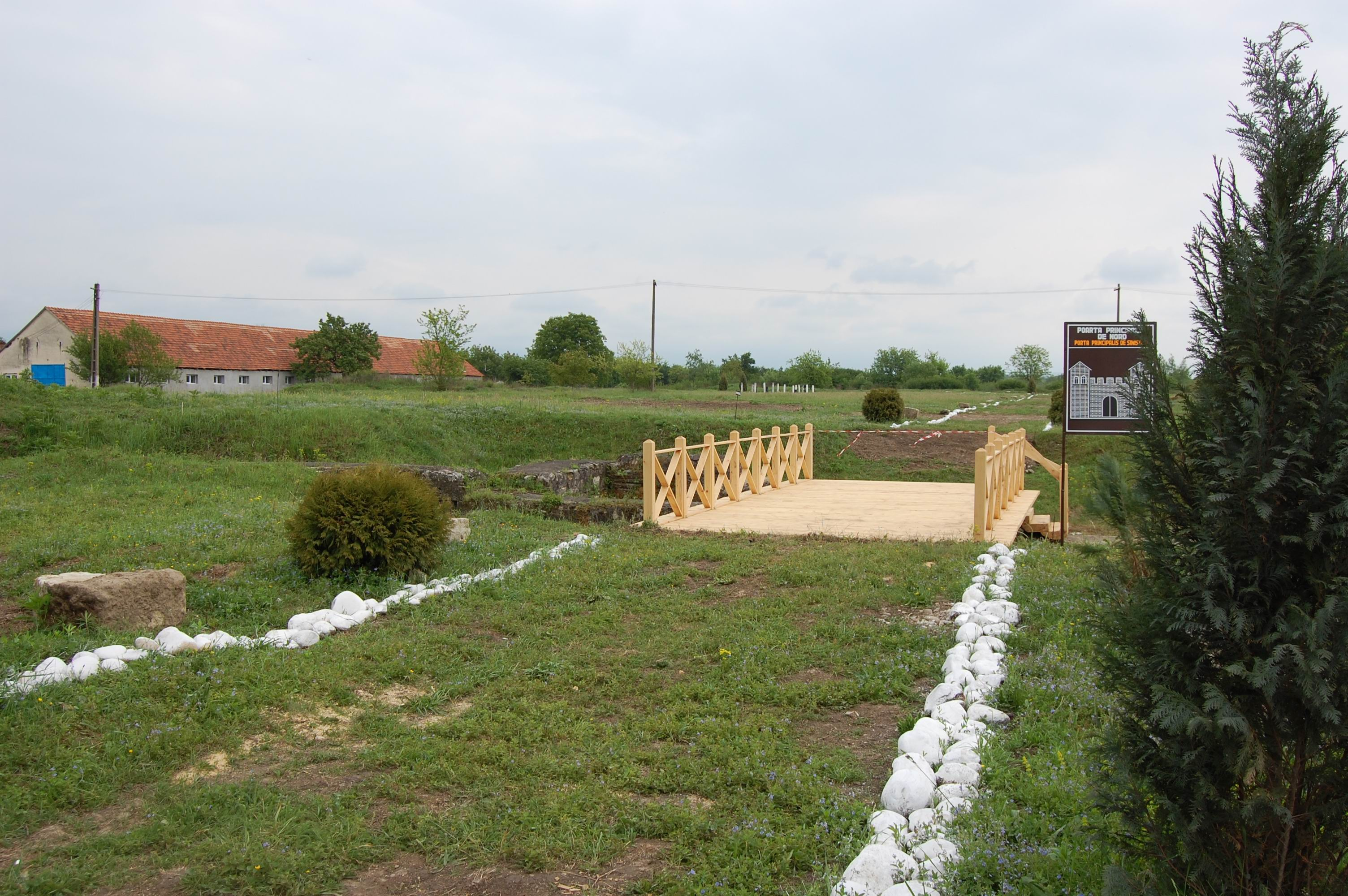 Situl arheologic Timiscum